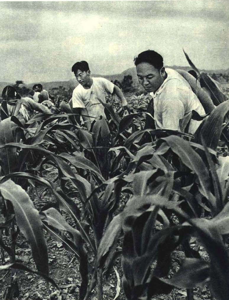 1963-10 1963年 作家李准